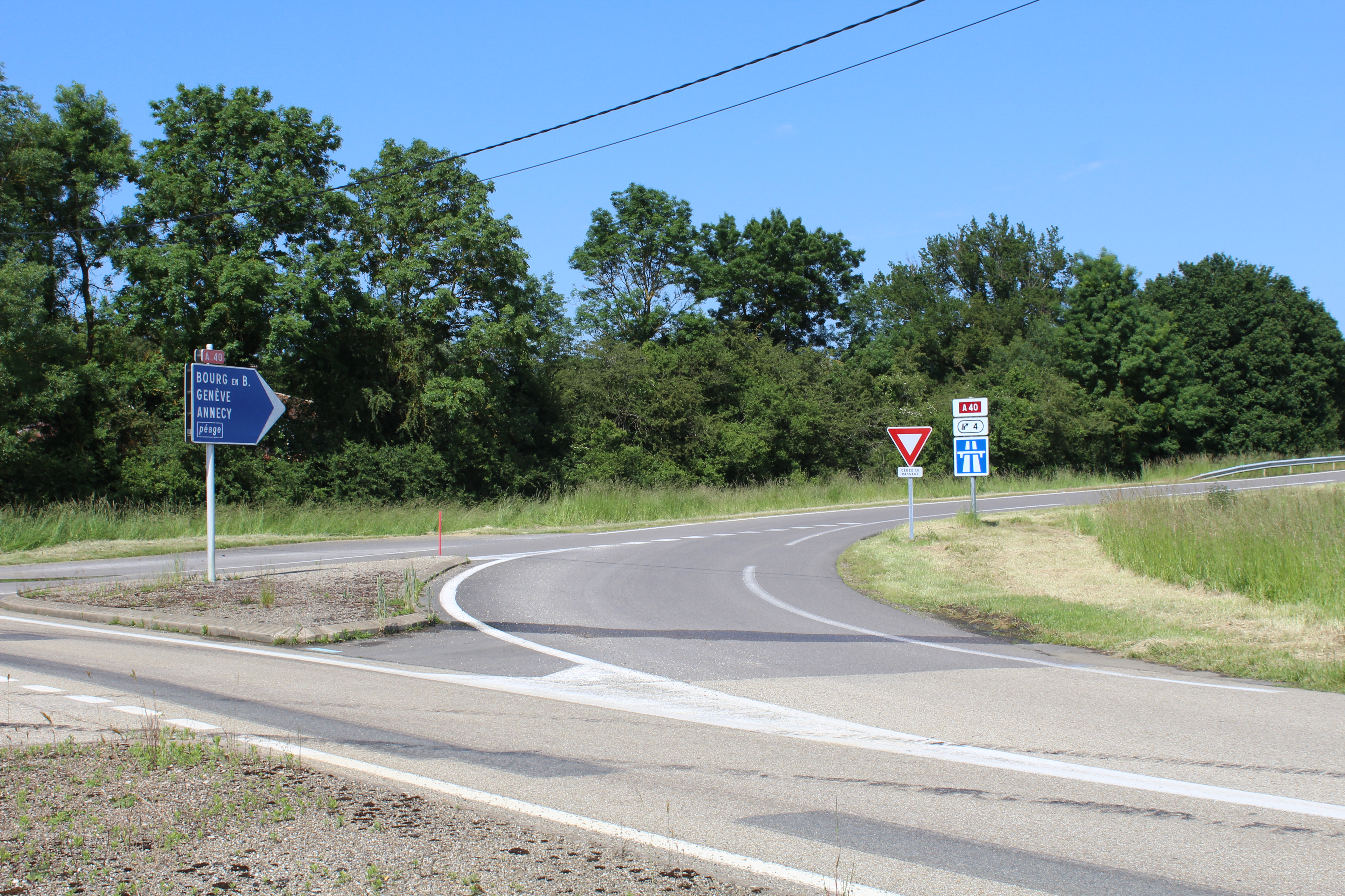 Voie donnant accès à la gare de péage de Saint-Genis-sur-Menthon près de l'autoroute A40.